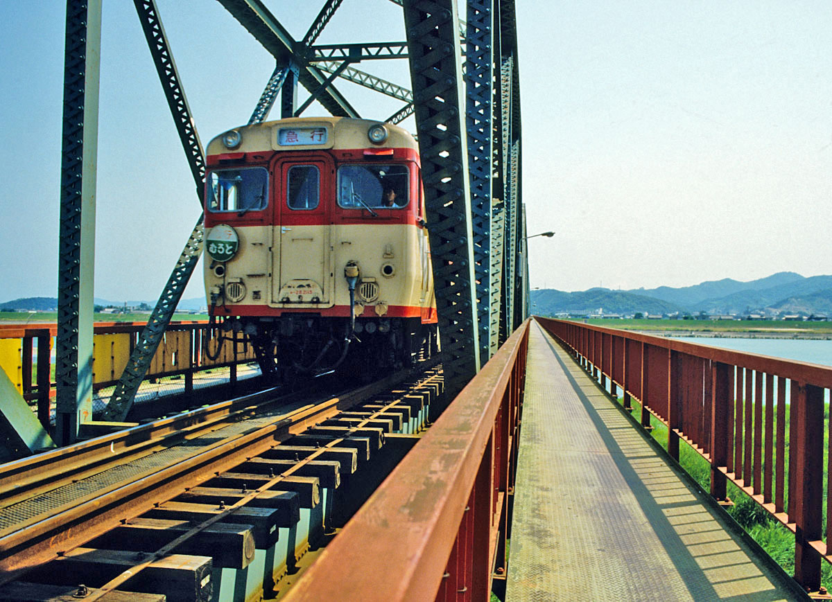 1985年当時の急行むろと